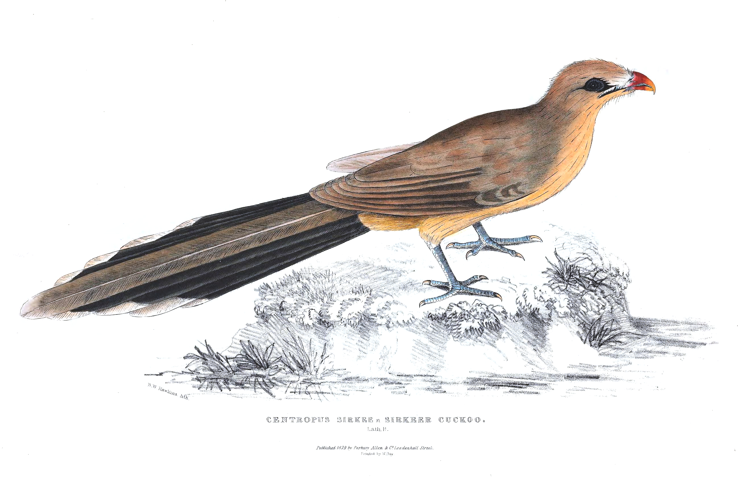 Sirkeer cuckoo